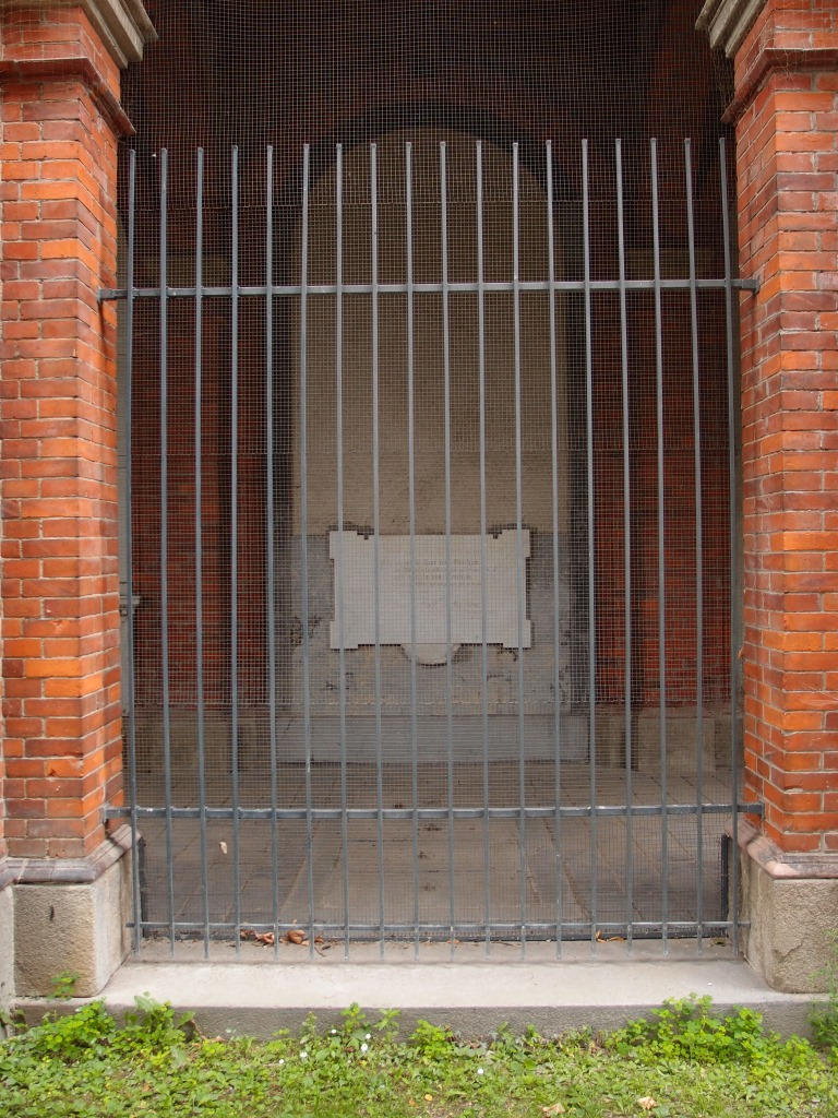 Grab des Diplomaten und Ministerialbeamten Graf Maximilian von Berchem (1841-1910) auf dem Alten Nördlichen Friedhof in München